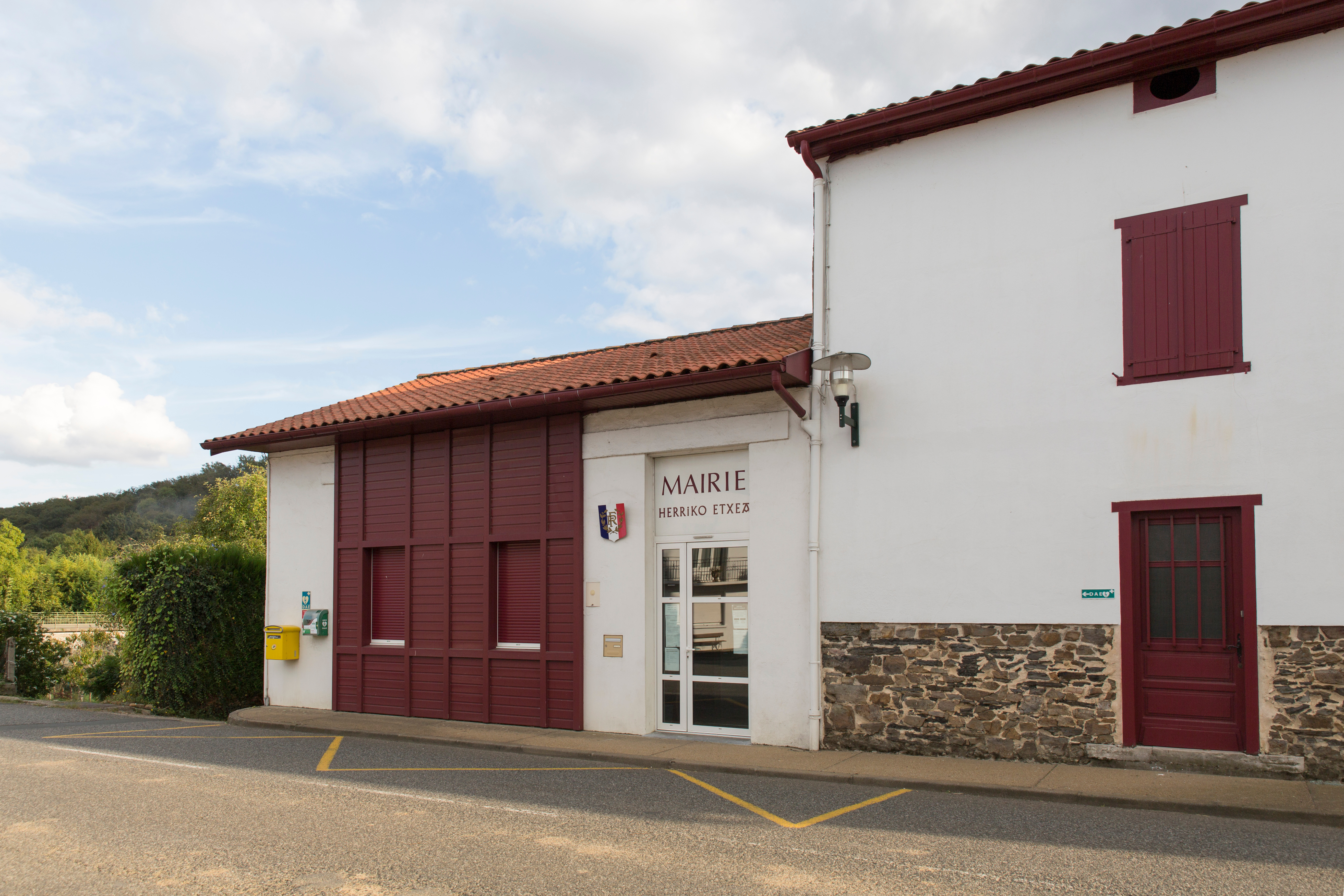 Mairie